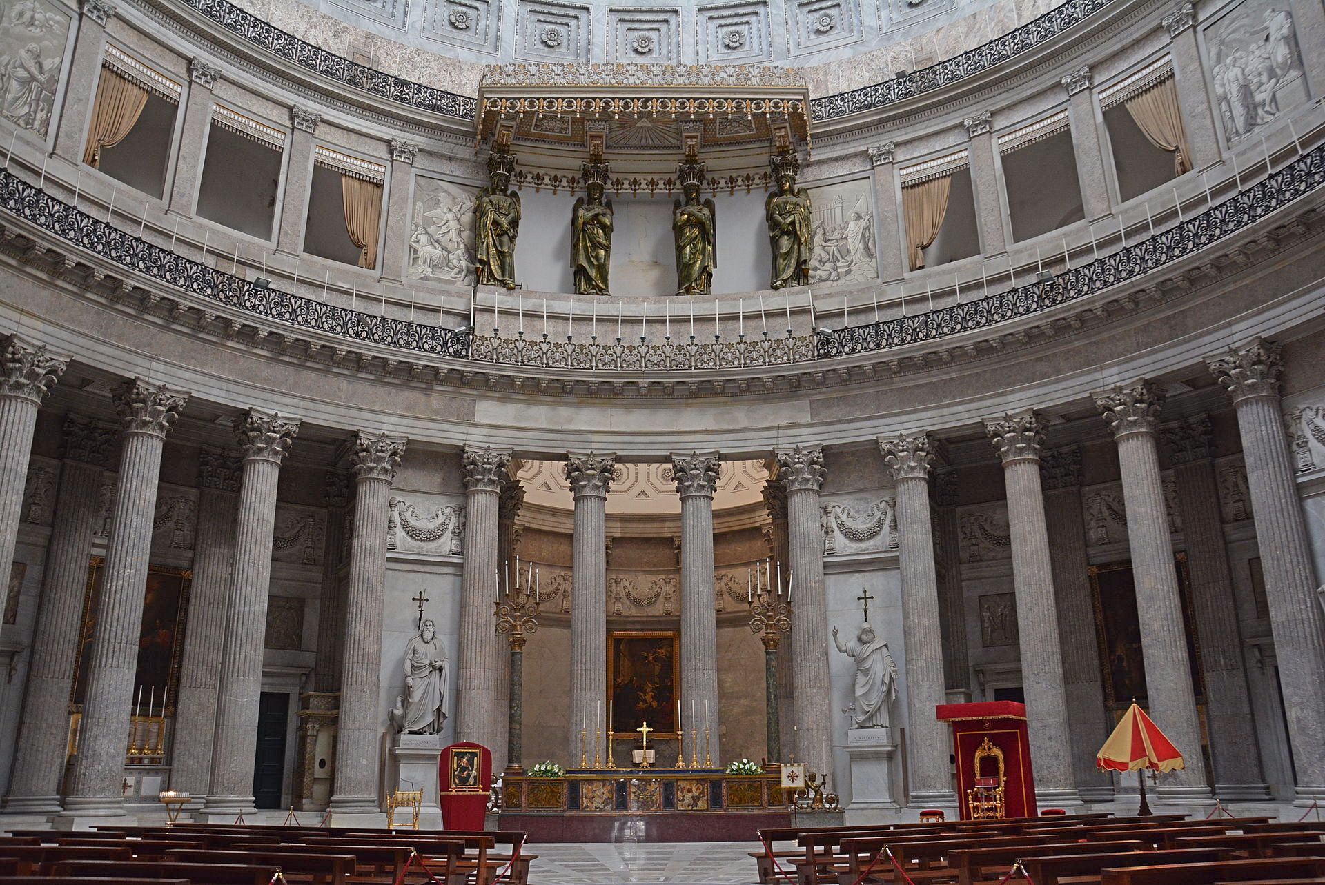 Basilica reale pontificia di San Francesco di Paola a Napoli